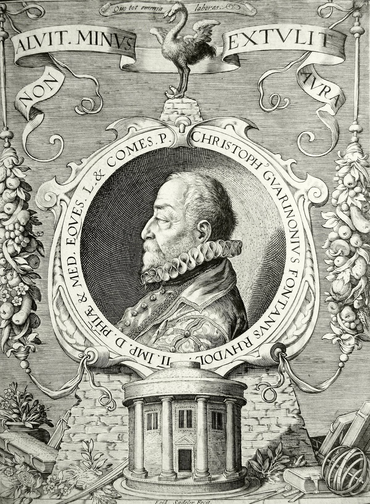 Portret Cristoforo Guarinoni - miedzioryt